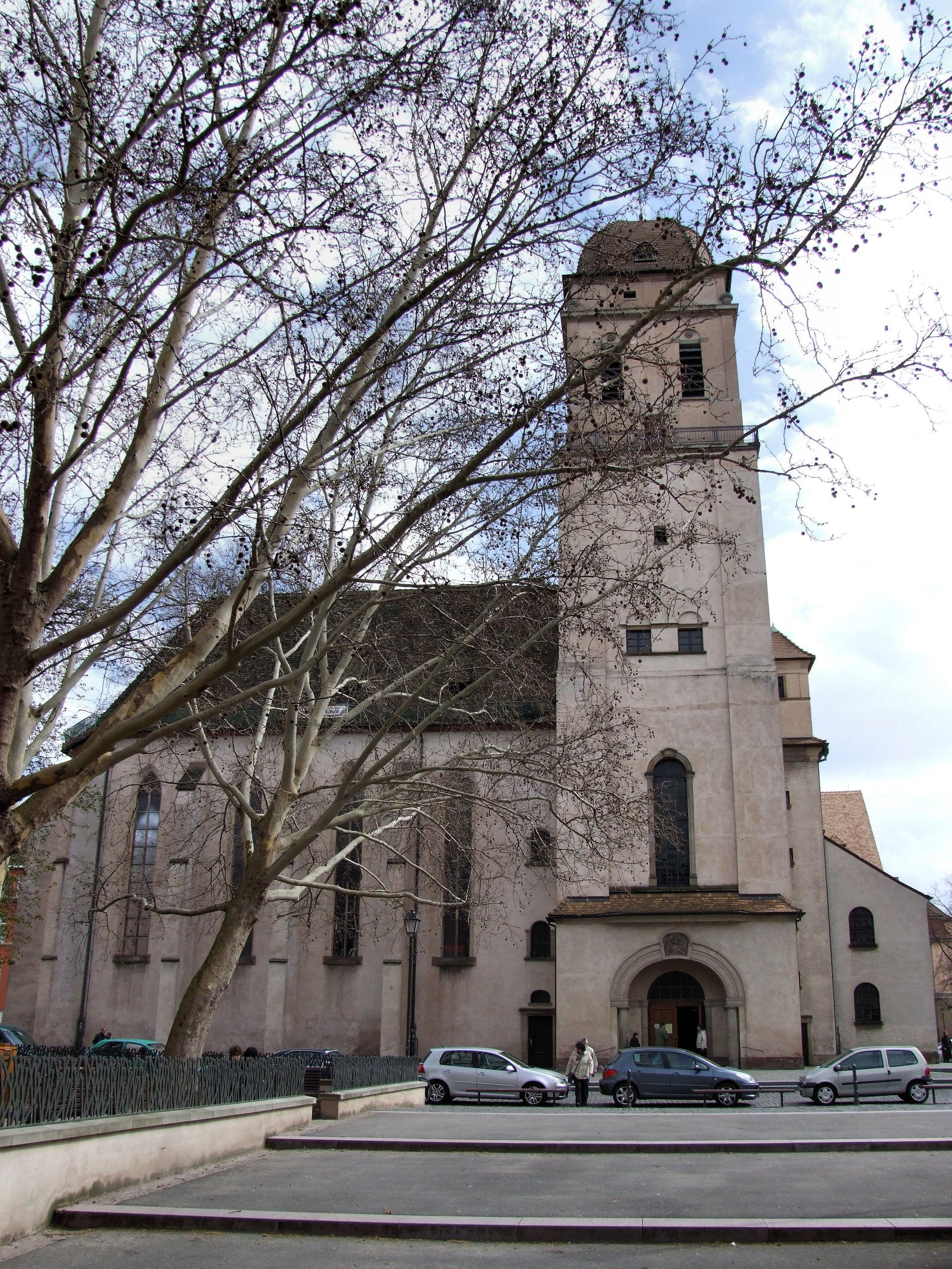 Eglise Saint Madeleine, Strasbourg